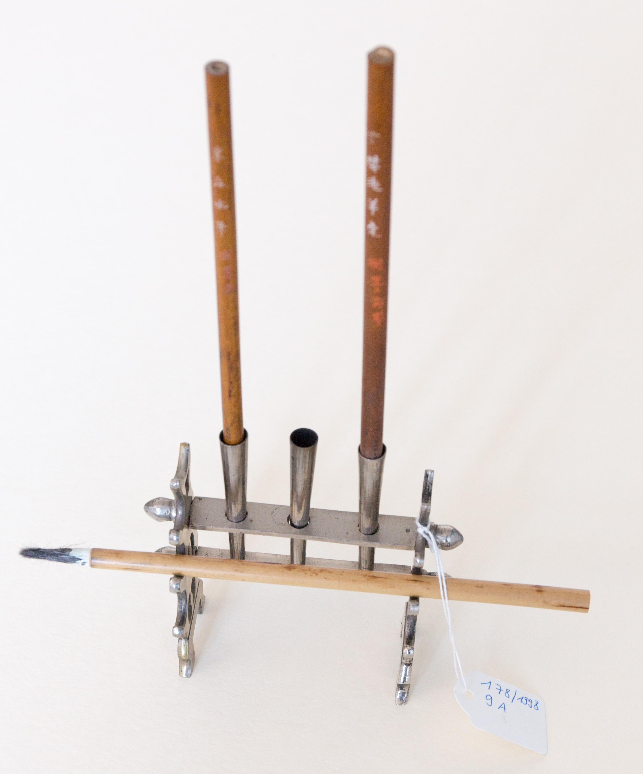 Schreibset; Kalligrafiepinsel (3) Indetifikations-Nr.: N (9 A) 178/1998 Datierung: um 1900? Geographischer Bezug: Berlin Höhe x Breite x Tiefe: 25 x 10,5 x 4,5 cm Ausgabe: Metall, verchromt, Holz Zustand: 2. leichte Schäden / befriedigendEin chinesisches Schreibset. Ein Schreibset, bestehend aus einem verchromten Metallständer mit 3 Hülsen für die 3 Schreibgeräte, die senkrecht in den Hülsen stecken. Die Schreibgeräte bestehen aus einem schlanken Holzstab (einer hell, 2 dunkler) mit Pinsel in unterschiedlichen Stärken. Auf 2 der Holzstäben befinden sich chinesische Schriftzeichen.